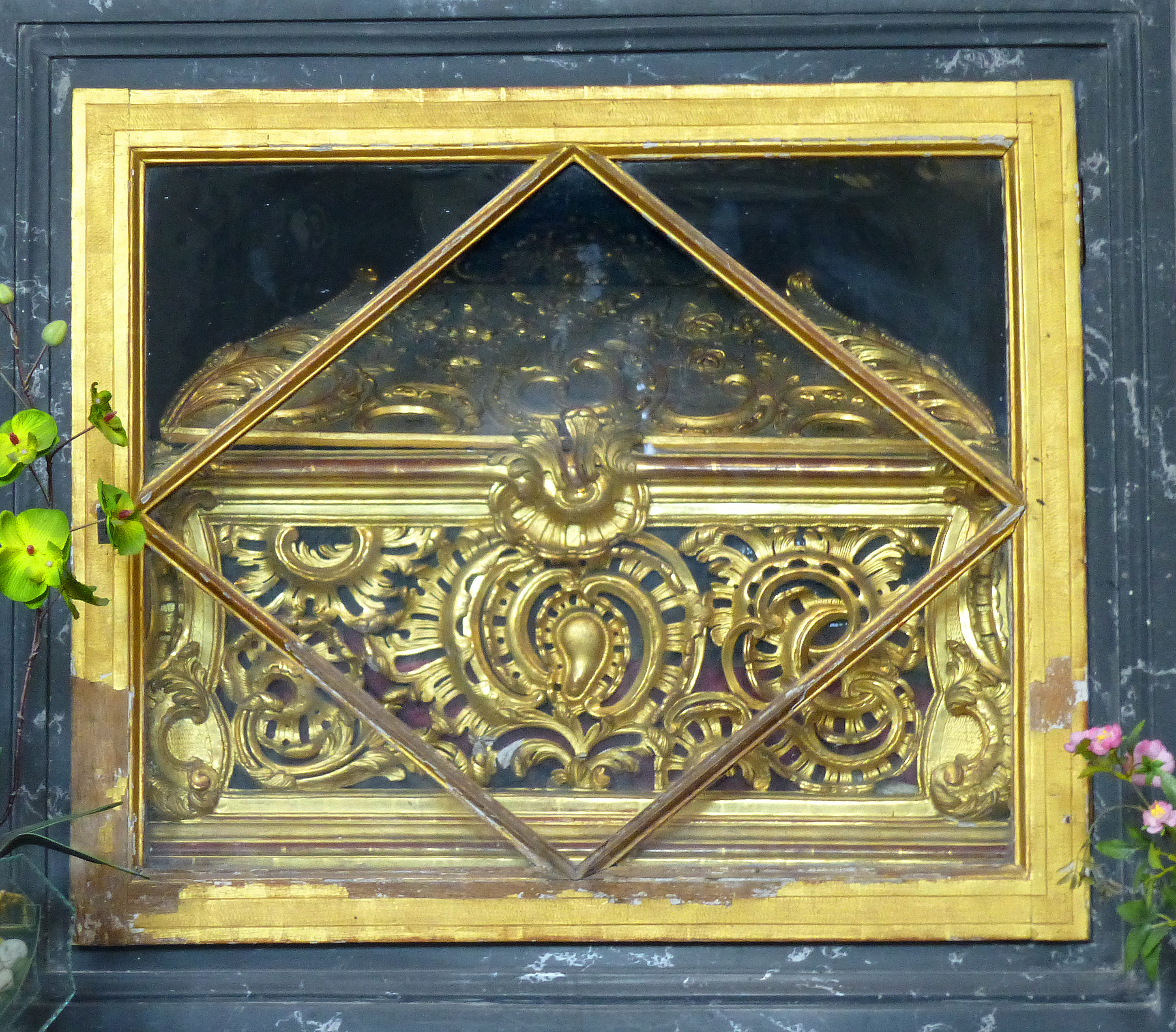 Abbaye de Moyenmoutier (Vosges) : châsse de saint Hydulphe